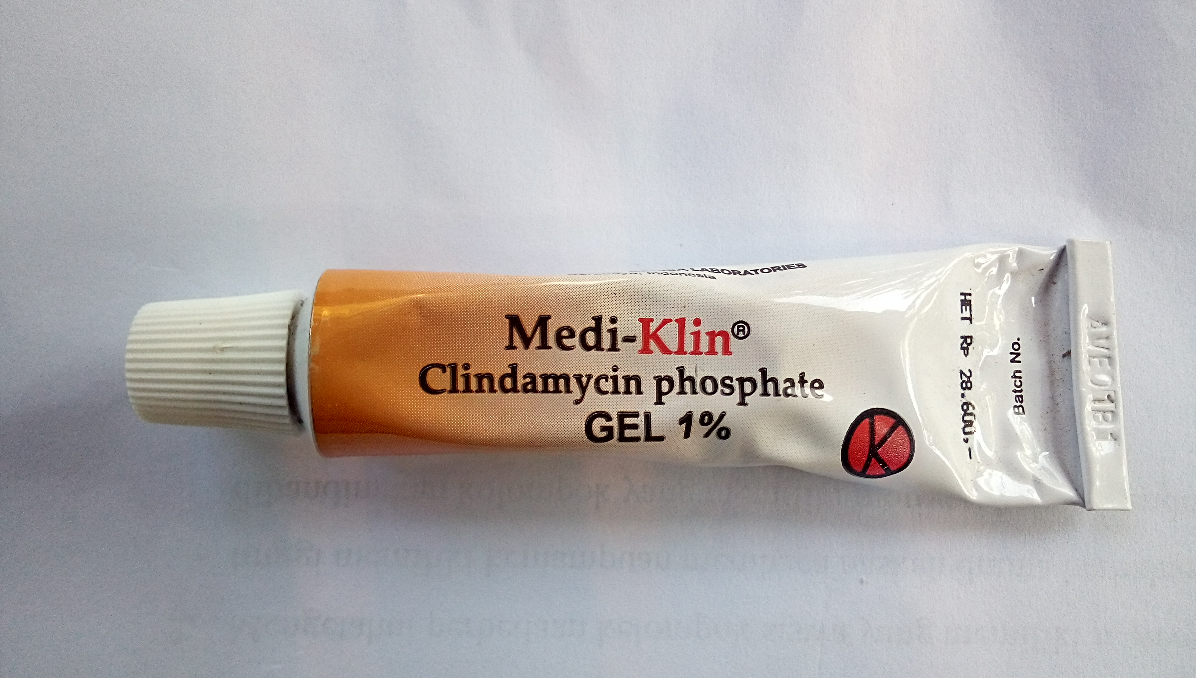 Jawa: Klindamisin sing awujud gèl iki kanggo tamba kukul sing ana ing kulit.